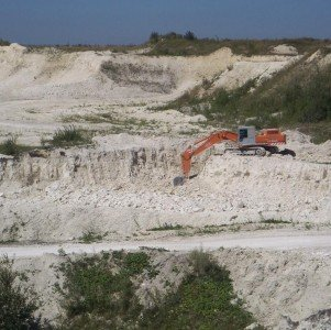 Карьер диатомита в г.Инза, Россия